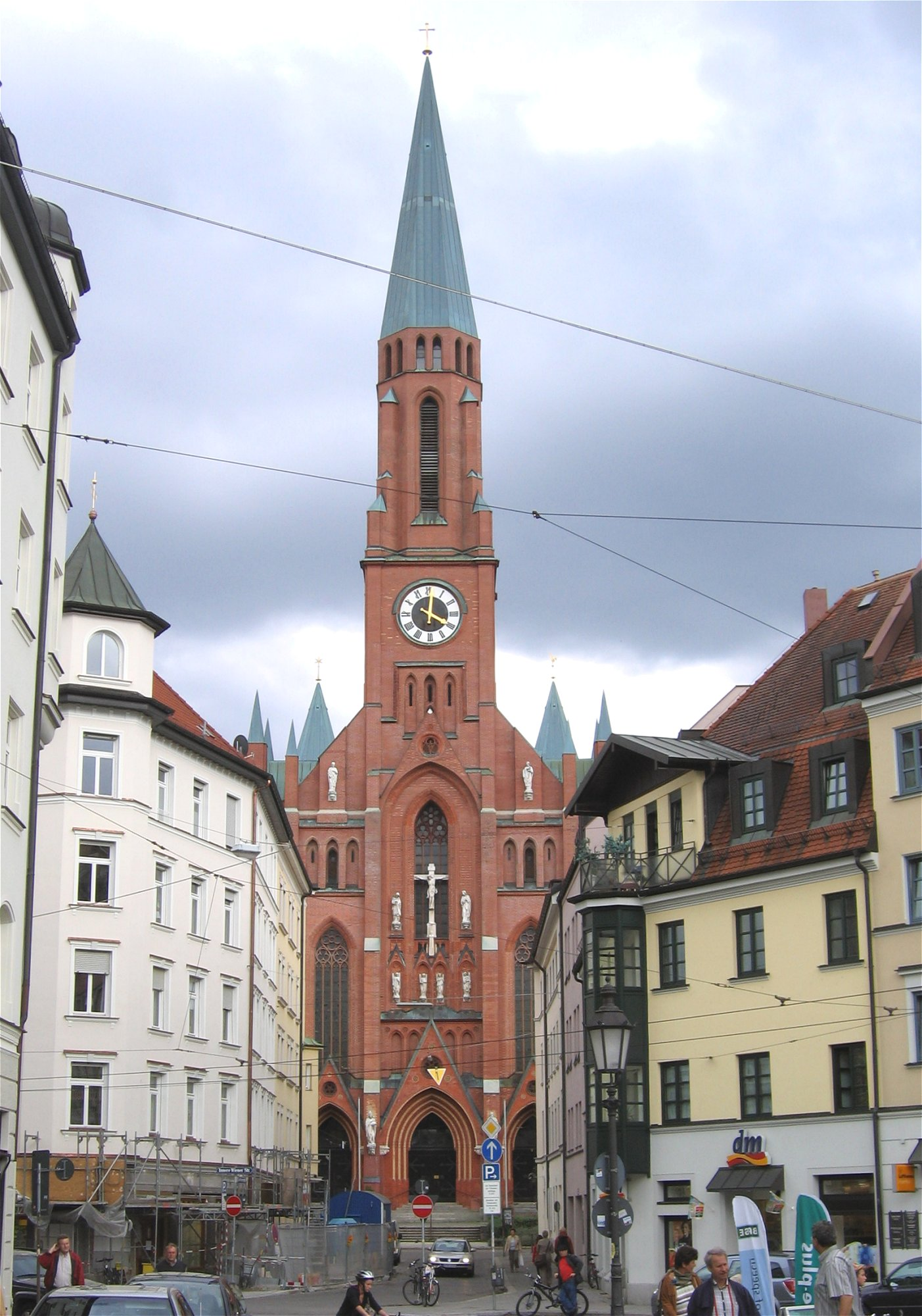 St. Johann Baptist, München-Haidhausen